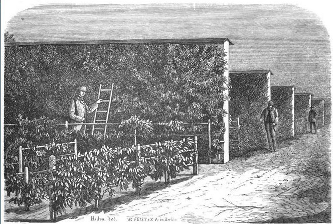 Leperesche Mauern